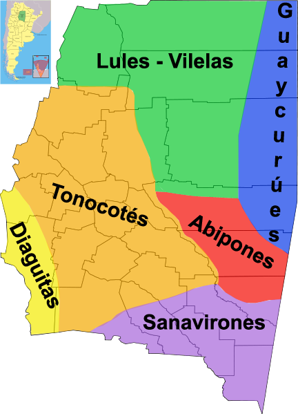 Mapa de la distribución de las principales tribus que habitaron el territorio de la provincia de Santiago del Estero a mediados del siglo XVI.